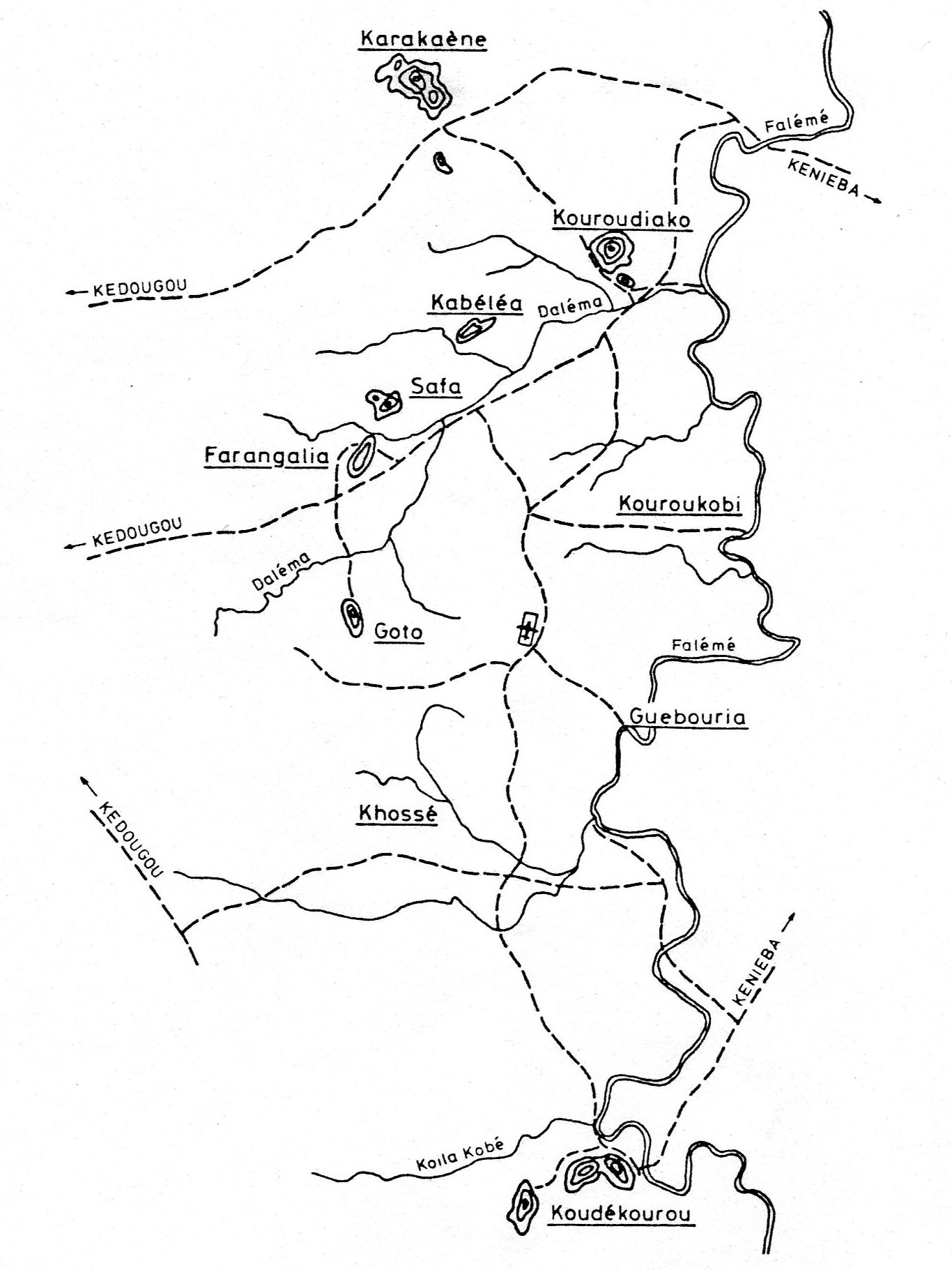 Falémé iron ore deposits